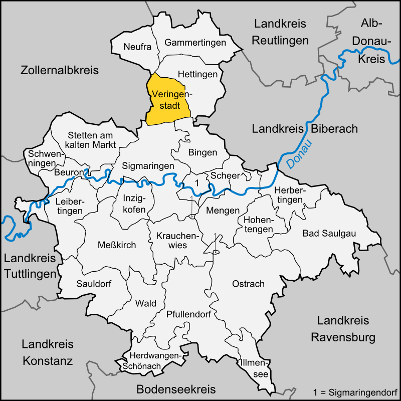 Karte der Stadt Veringenstadt im Landkreis Sigmaringen